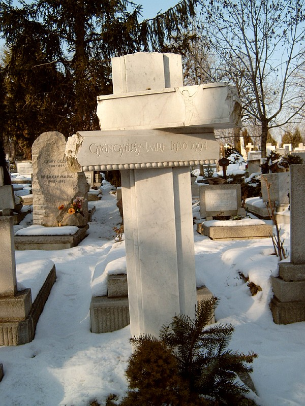 Gyöngyössy Imre sírja Budapesten. Farkasréti temető: 25-1-23/1.